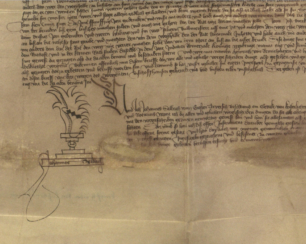 Notariatsinstrument des Johannes Selbach, Stadtarchiv Speyer